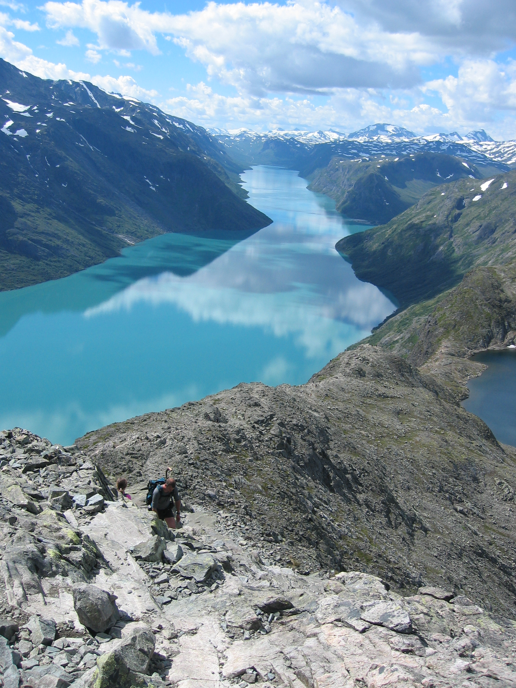 Lake Gjende seen from Besseggen in Jotunheimen.